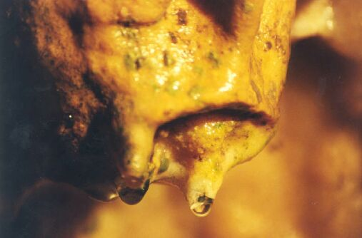 Nahaufnahme Tropfstein, Charlottenhöhle, GeoPark Schwäbische Alb